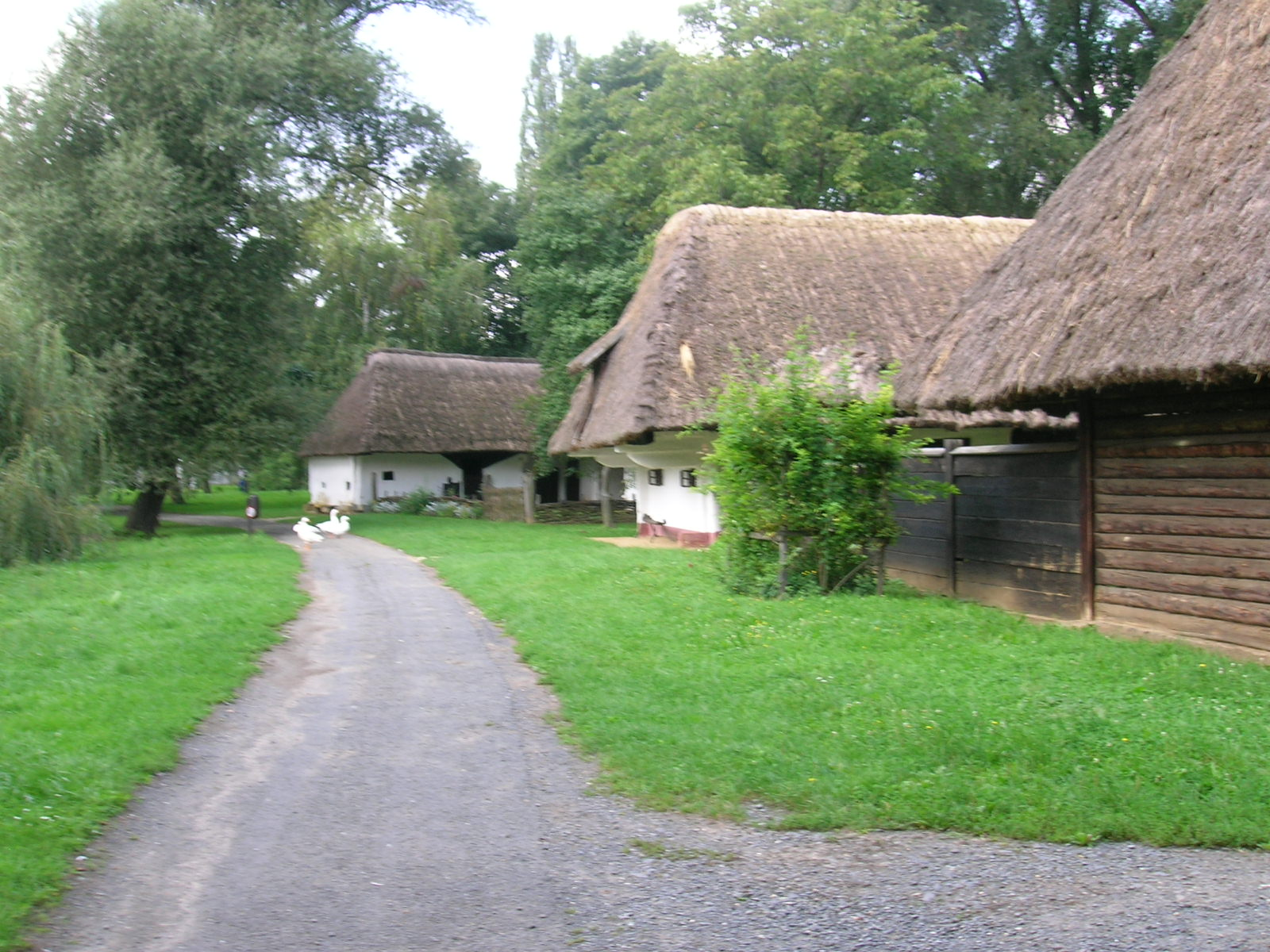 Street of an old Hungarian village. Göcsej Village Museum, Zalaegerszeg, Hungary.